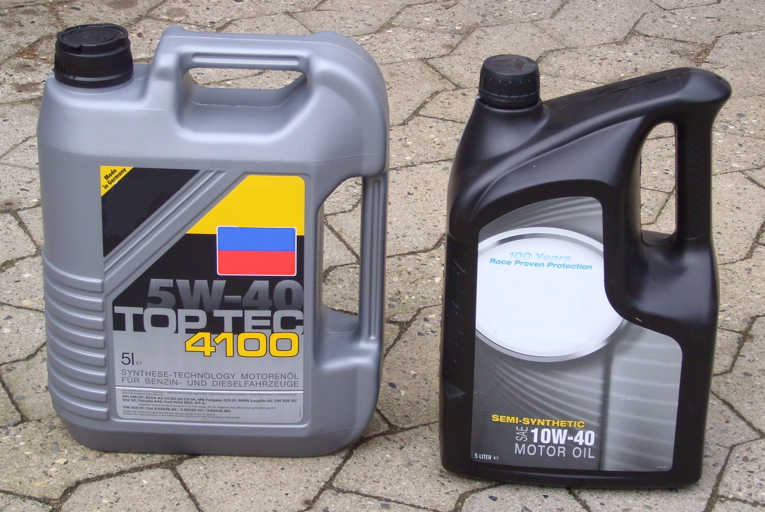 2 Ölkanister, Mehrbereichs-Motoröle